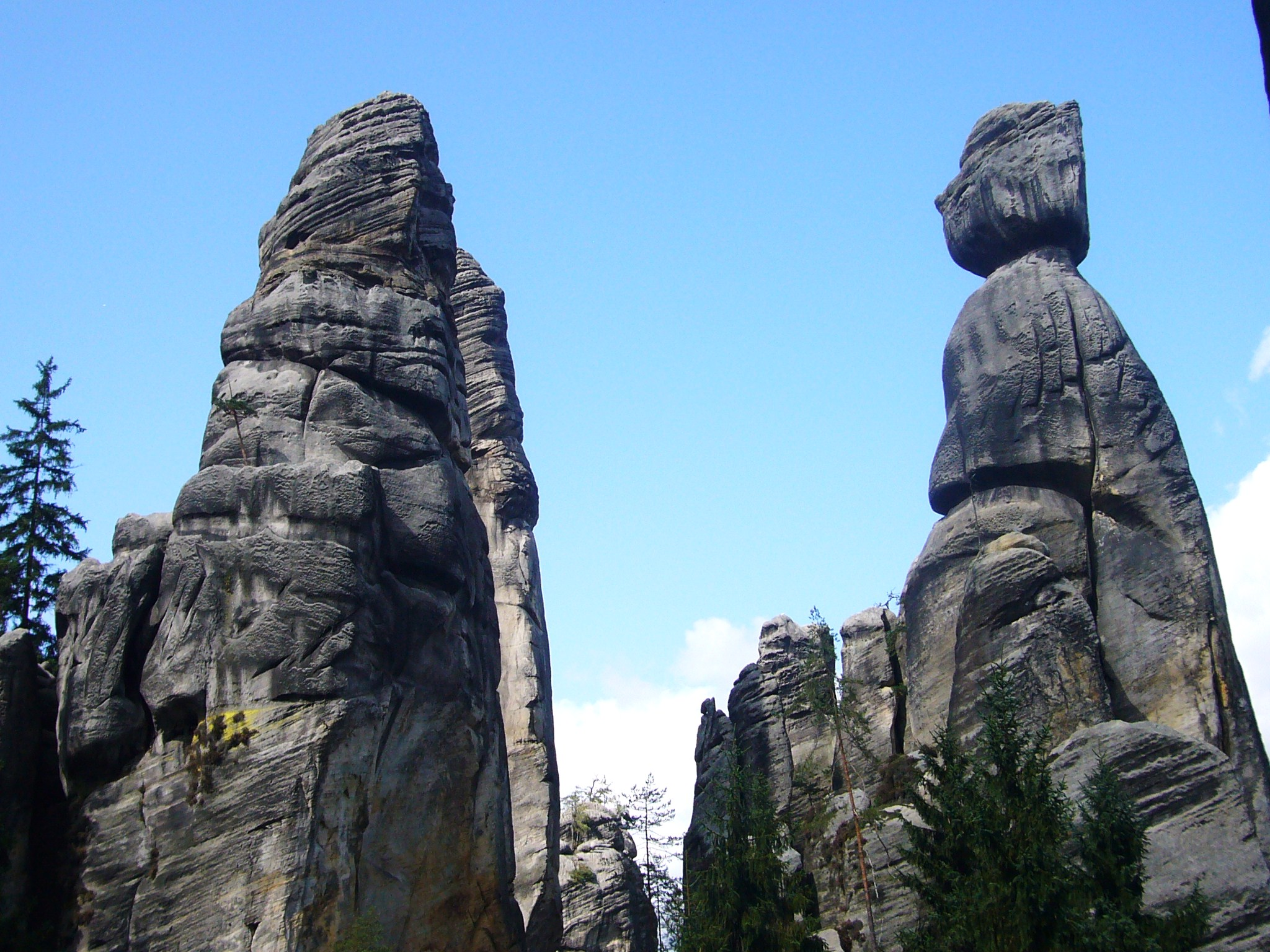 Starosta a starostová v Adršpašsko-teplických skalách.